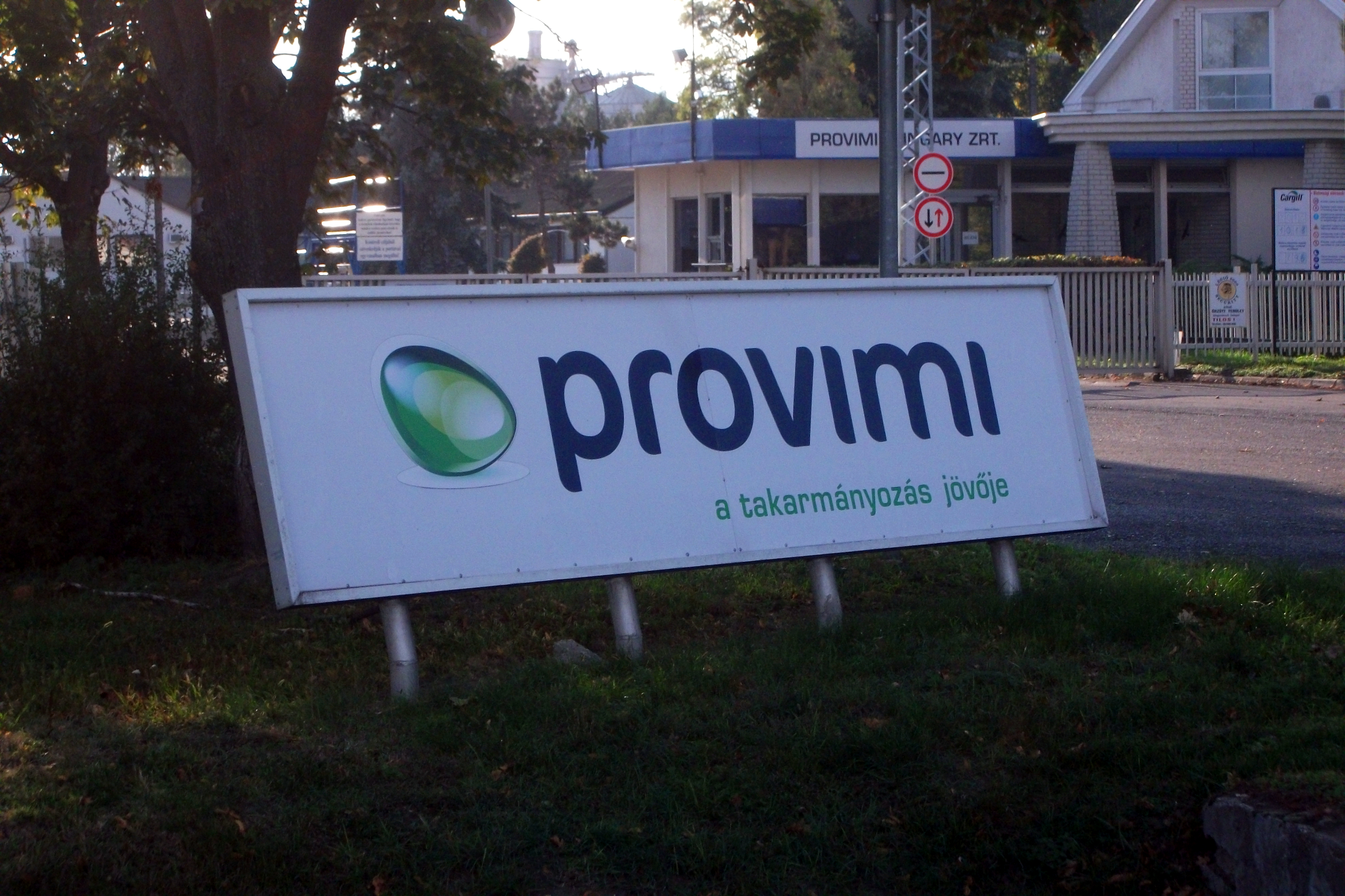 A Provimi cég logója Zichyújfaluban.